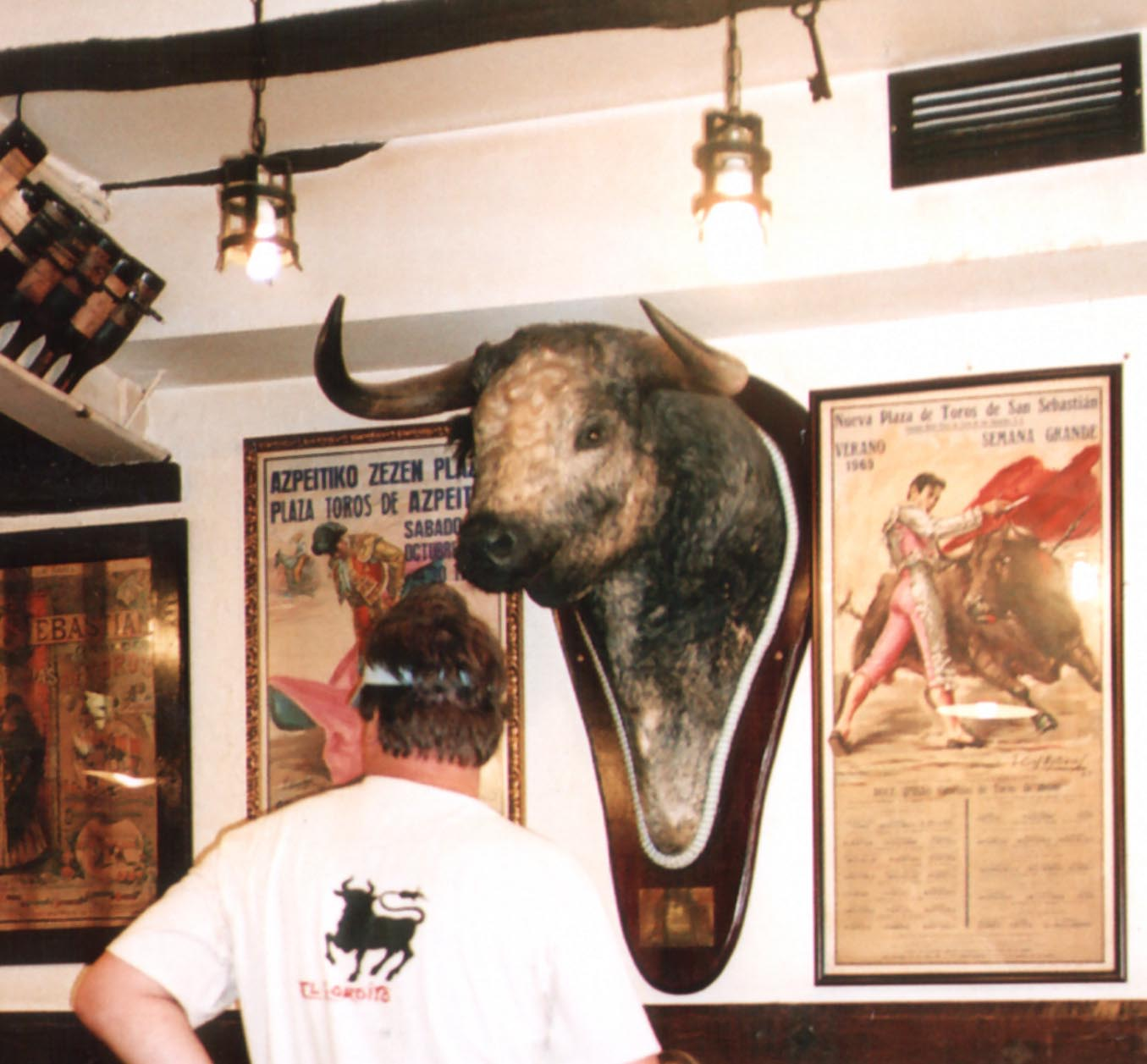 M. Pfeiffer nebst Toro (Donostia / San Sebastian) Datum: 12.08.2007 Quelle: selbst erstelltes Familienfoto in der Altstadt von San Sebastian Urheber: M. Pfeiffer alias Benutzer:1869 (Selbstauslöser)